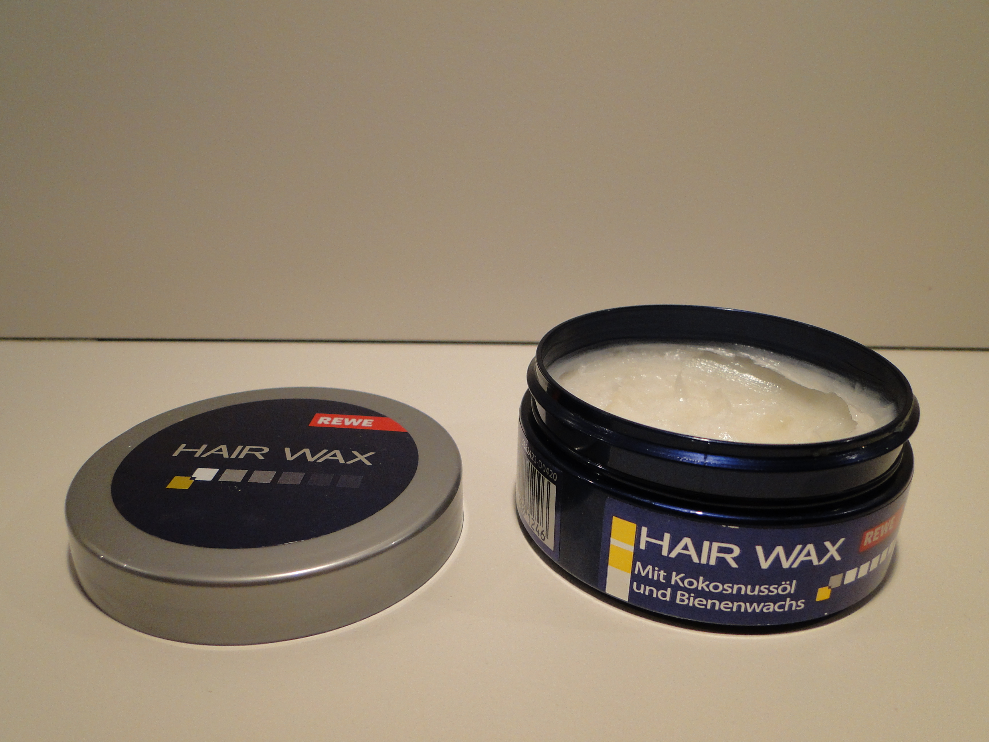 Dose Haarwachs